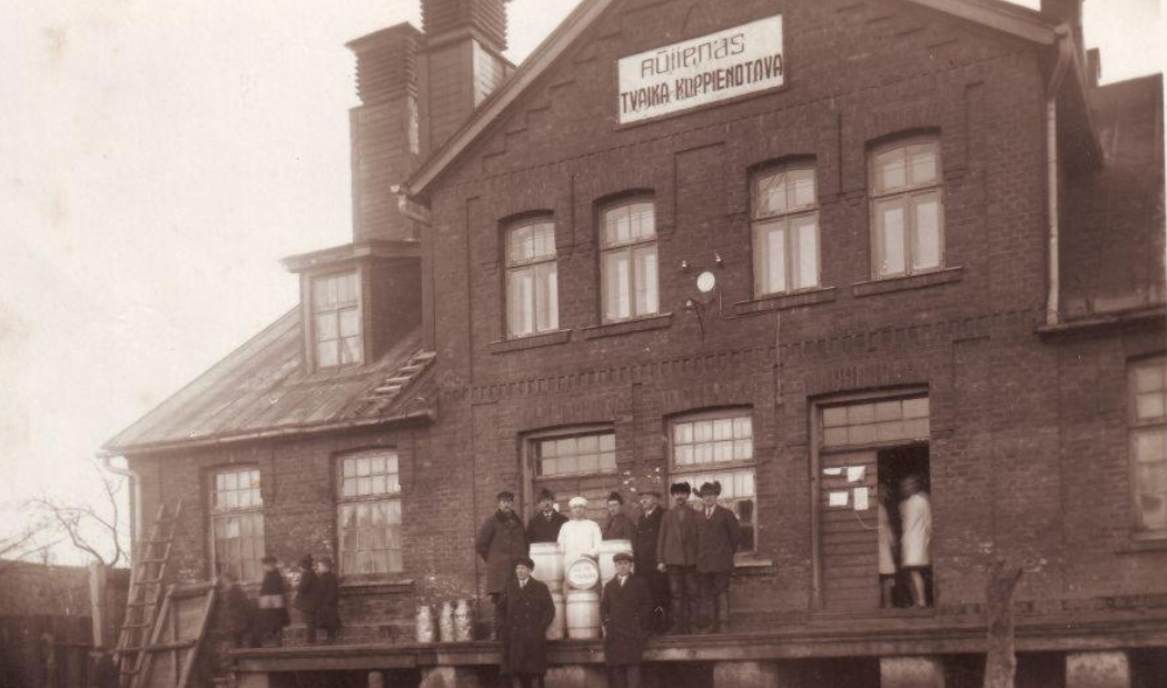 Rūjienas koppienotava 20. gadsimtā